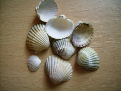 Zdjęcie muszelek sercówki jadalnej